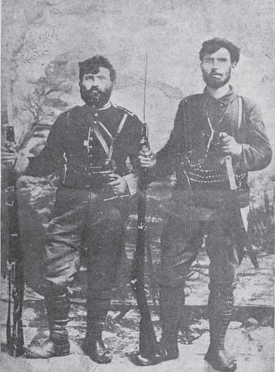 Никола Андреев и Марко Иванов.